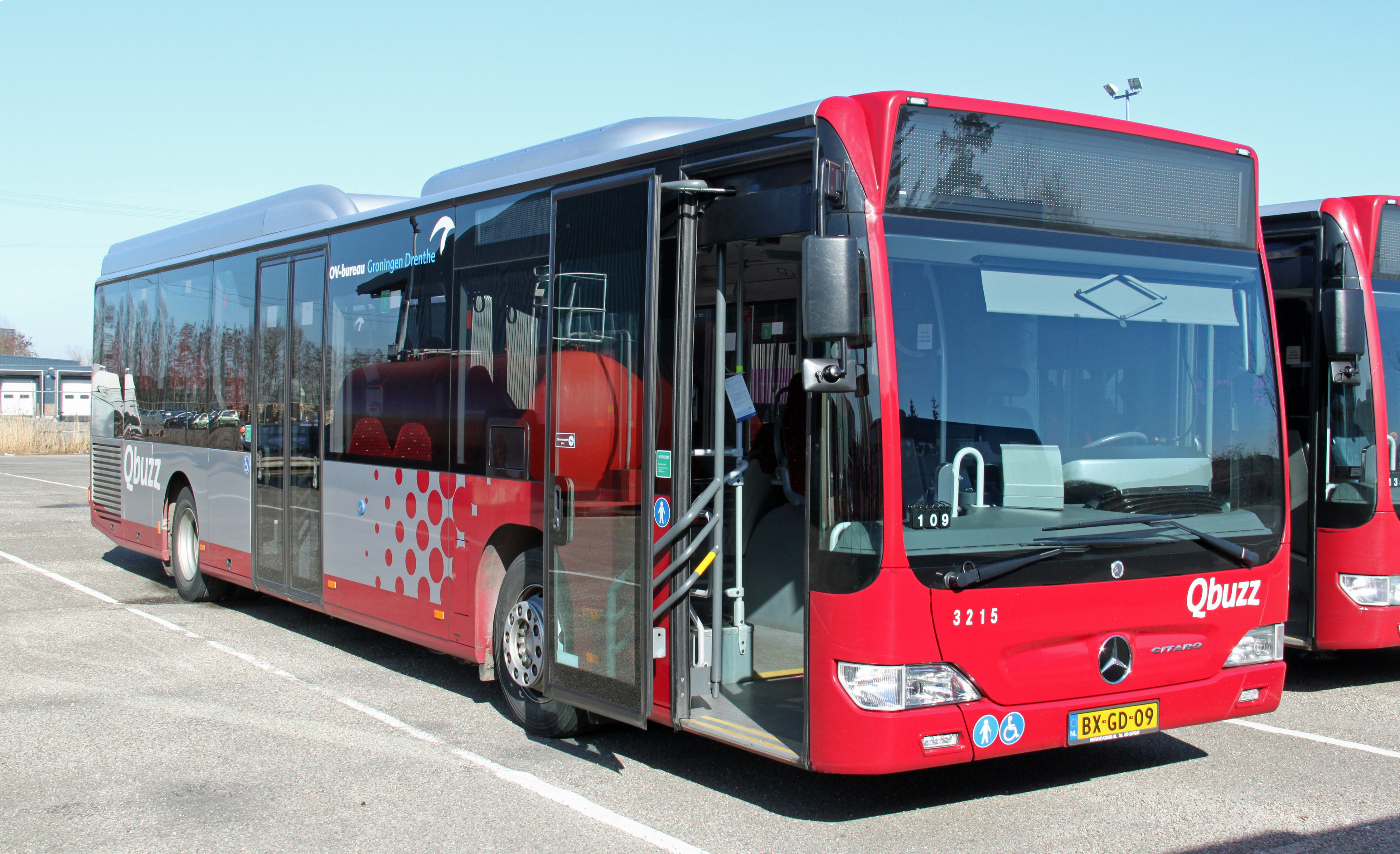 Een Mercedes-Benz O530LE van Qbuzz in Groningen.